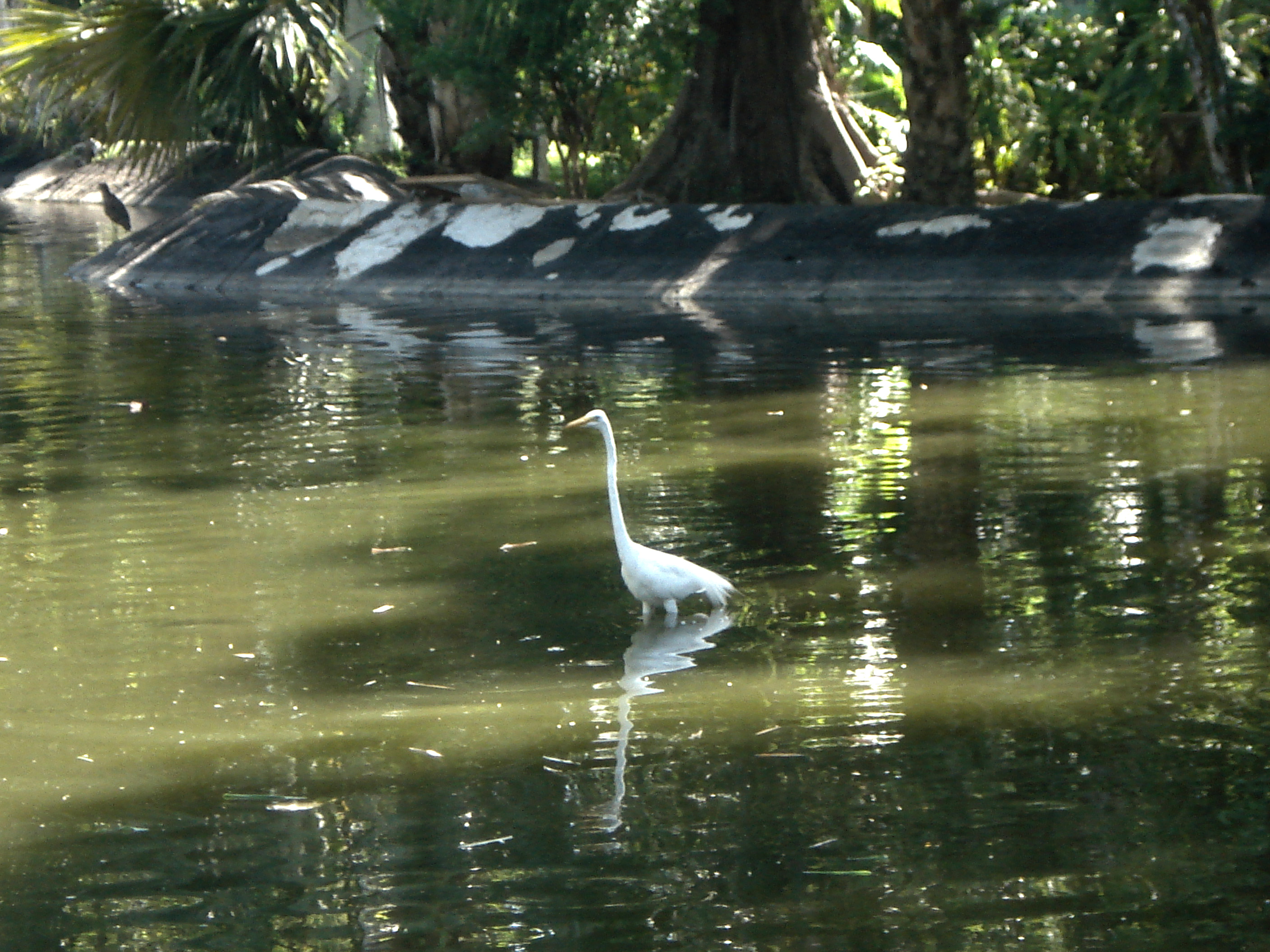 Ave en el lago artificial del Parque Papagayo, en Acapulco, Guerrero, México.